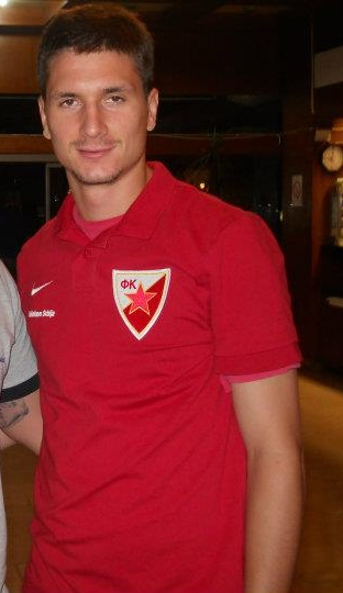 Милан Вилотић